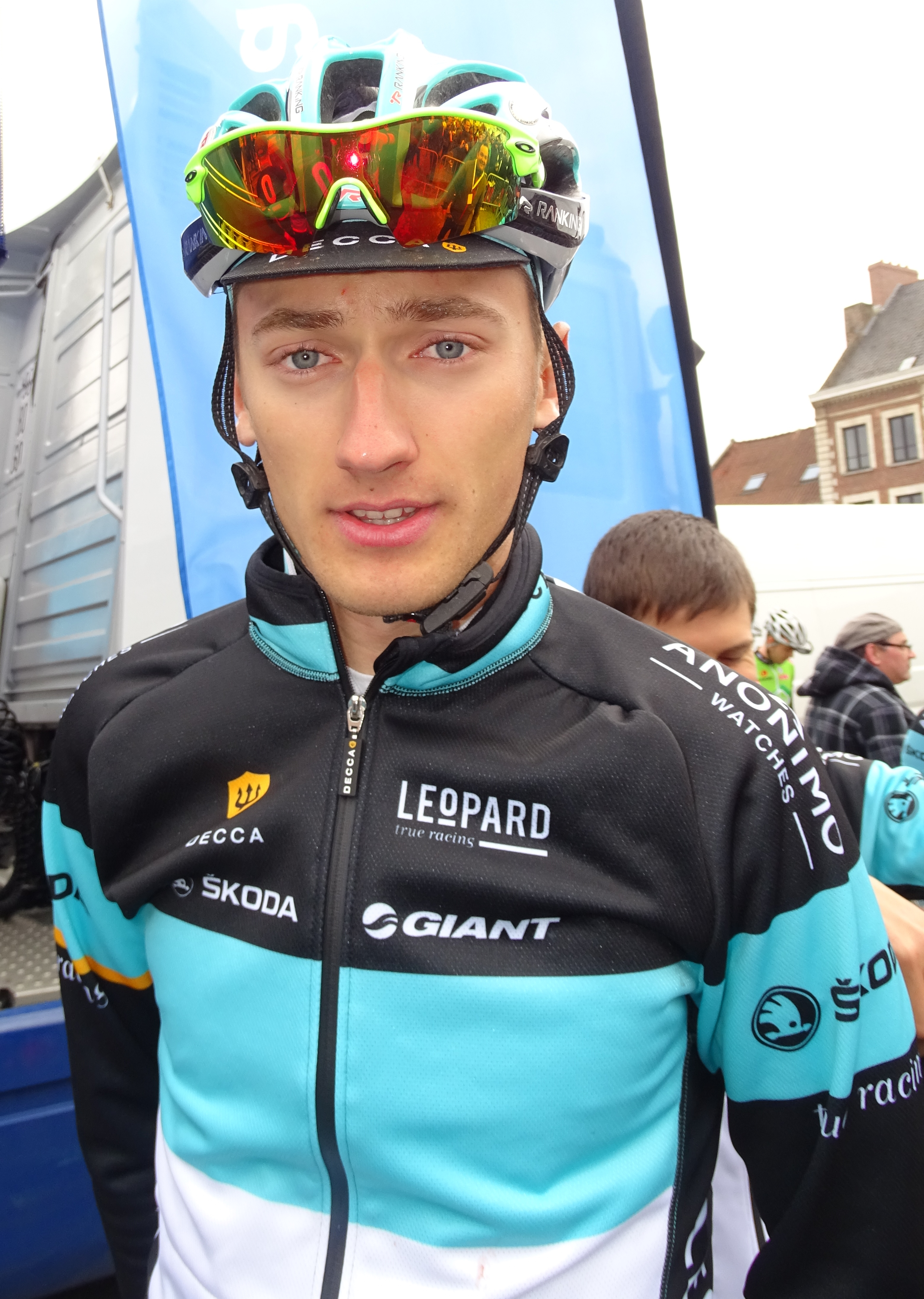 Reportage réalisé le dimanche 6 mars à l'occasion du départ et de l'arrivée du Grand Prix de Lillers-Souvenir Bruno Comini 2016 à Lillers, Pas-de-Calais, Nord-Pas-de-Calais, France.